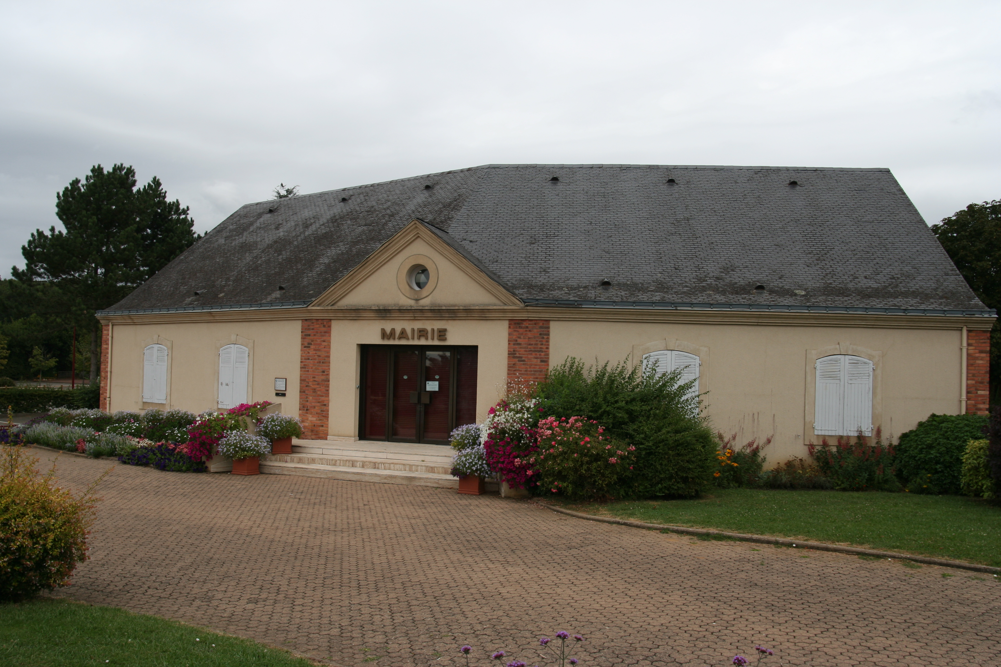 La mairie de Lombron.